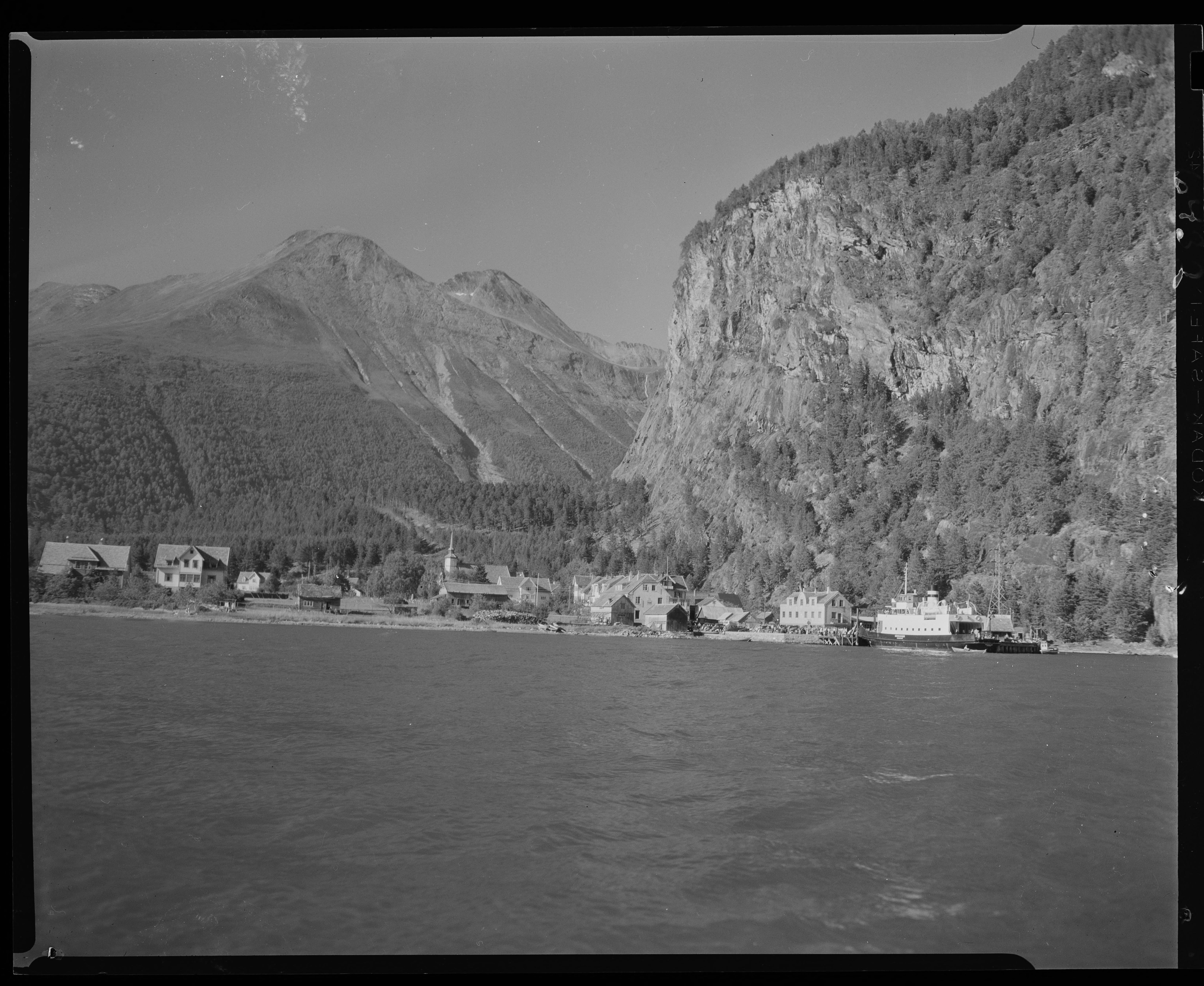 Bildet er hentet fra Nasjonalbibliotekets bildesamling. Anmerkninger til bildet var: Fotograf : ukjent Valldal, Norddal, Møre og Romsdal